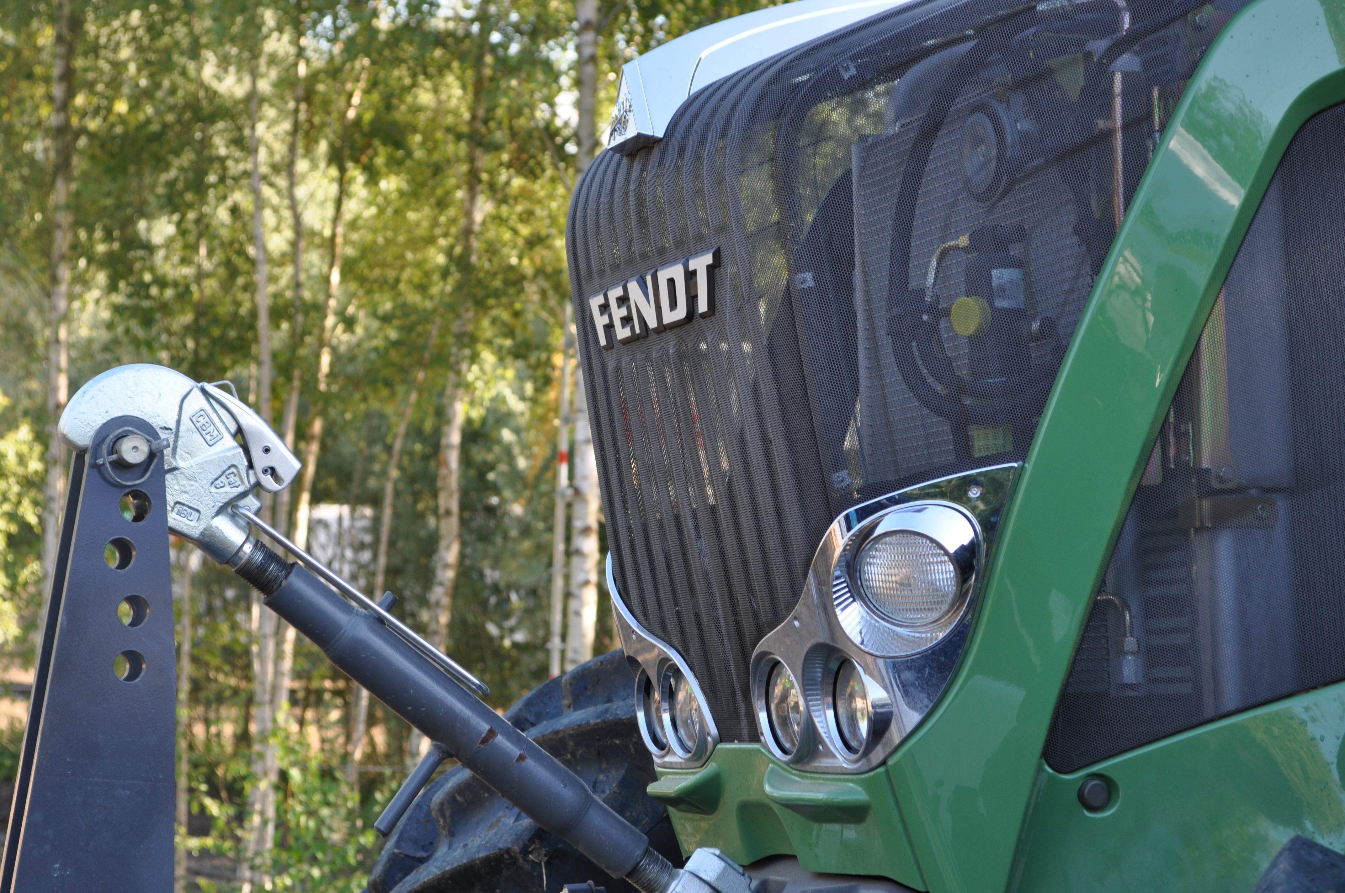 De grille van een Fendt 824, getrokken op Matexpo op 8/08/2013